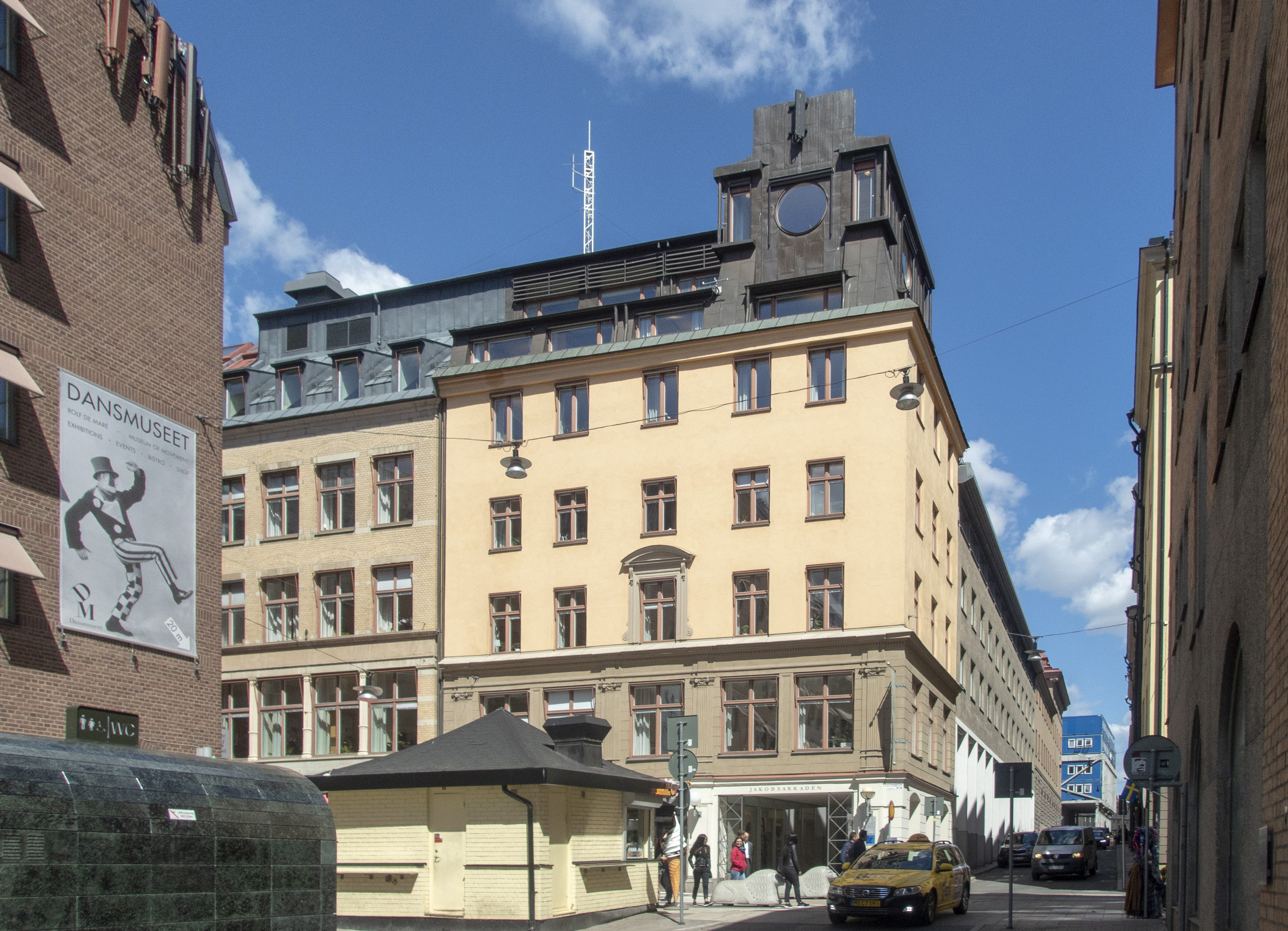 Mäster Dyks hus, Drottninggatan 10 / Jakobsgatan Stockholm. Uppfört 1640 för Mäster Gudmund Dyk.Om och tillbyggt 1872. Arkitekt: Axel Kumlien